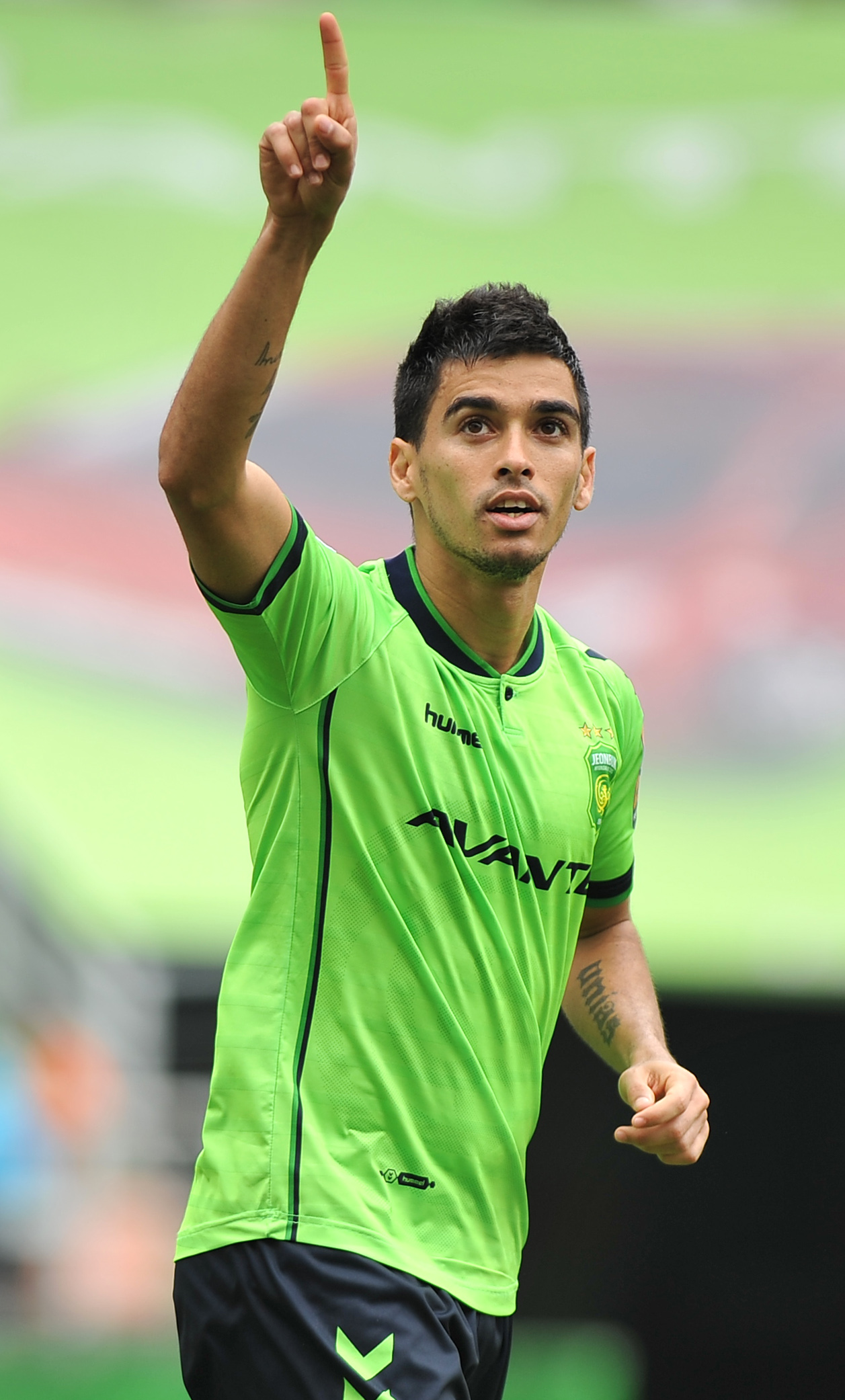 출처